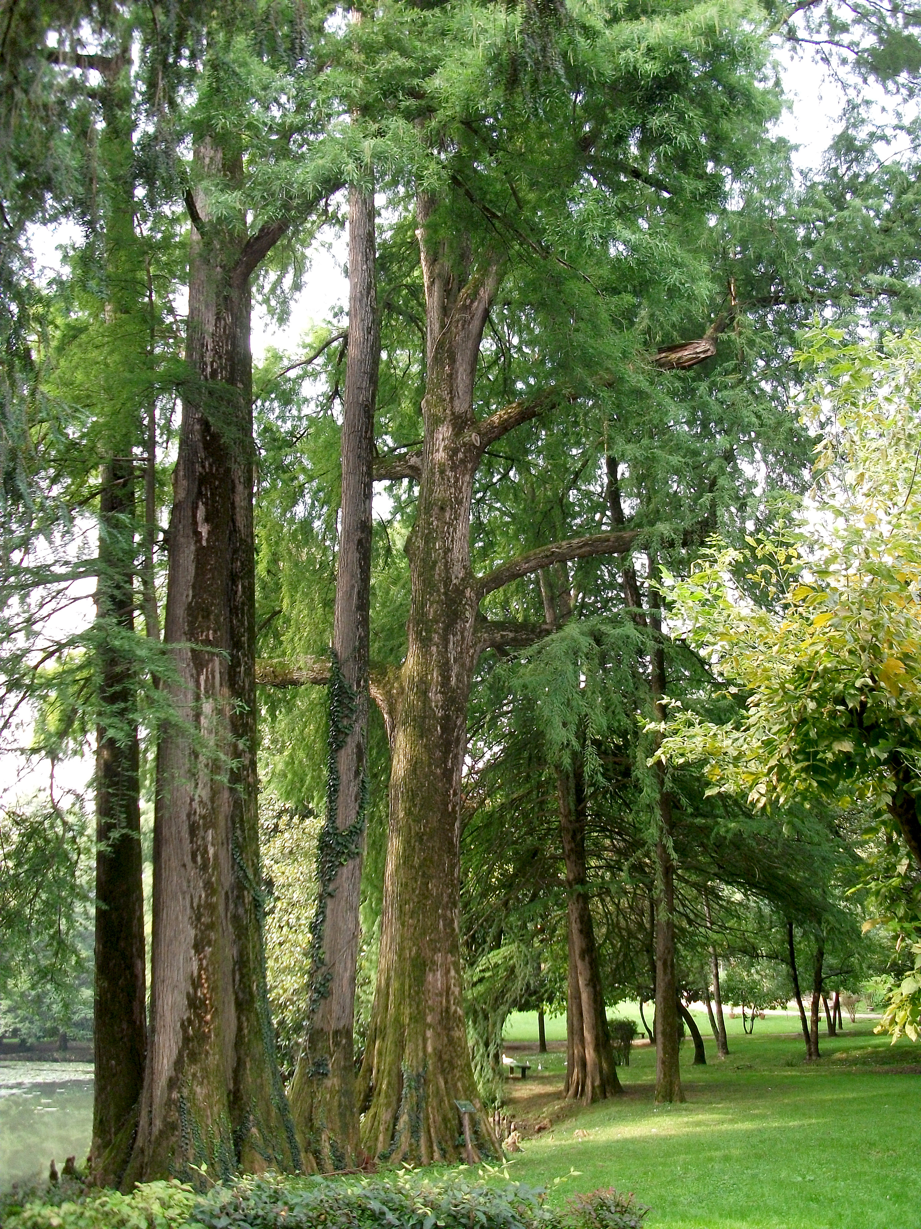 cipresso calvo This is a photo of a monument which is part of cultural heritage of Italy.